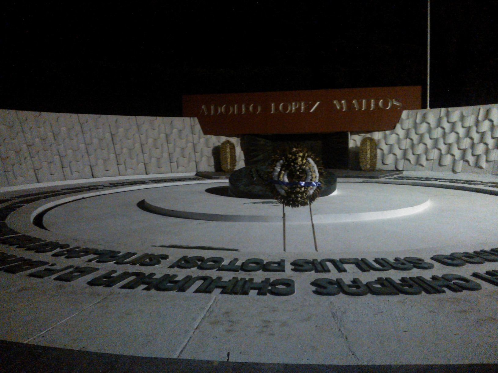 Es aqui donde descansan los restos del ex presidente Adolfo Lopez Mateos y los de su esposa.